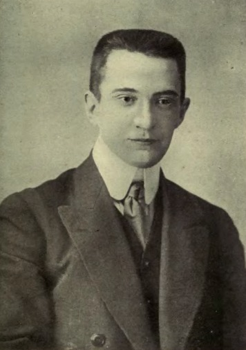 Aleksandr Kérenski, abogado, político socialrrevolucinario, ministro y más tarde primer ministro del Gobierno Provisional.